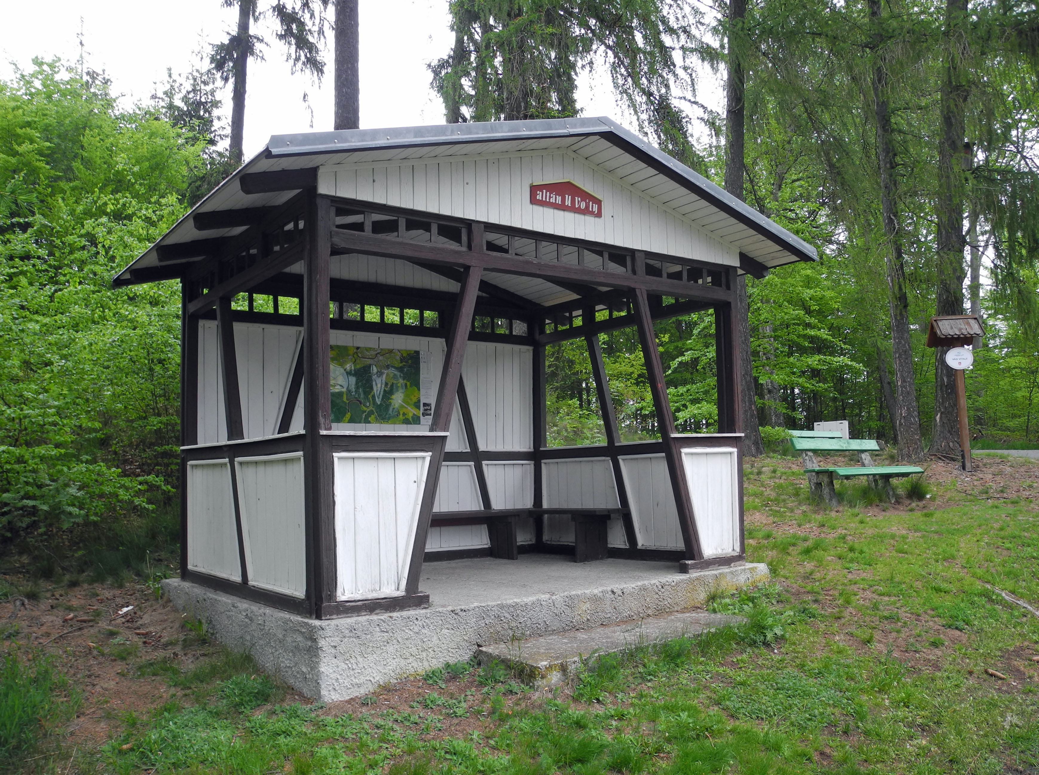 Altán u Vojty (chata Na Hůrkách) am Weg zum Goetheturm bei Hůrky